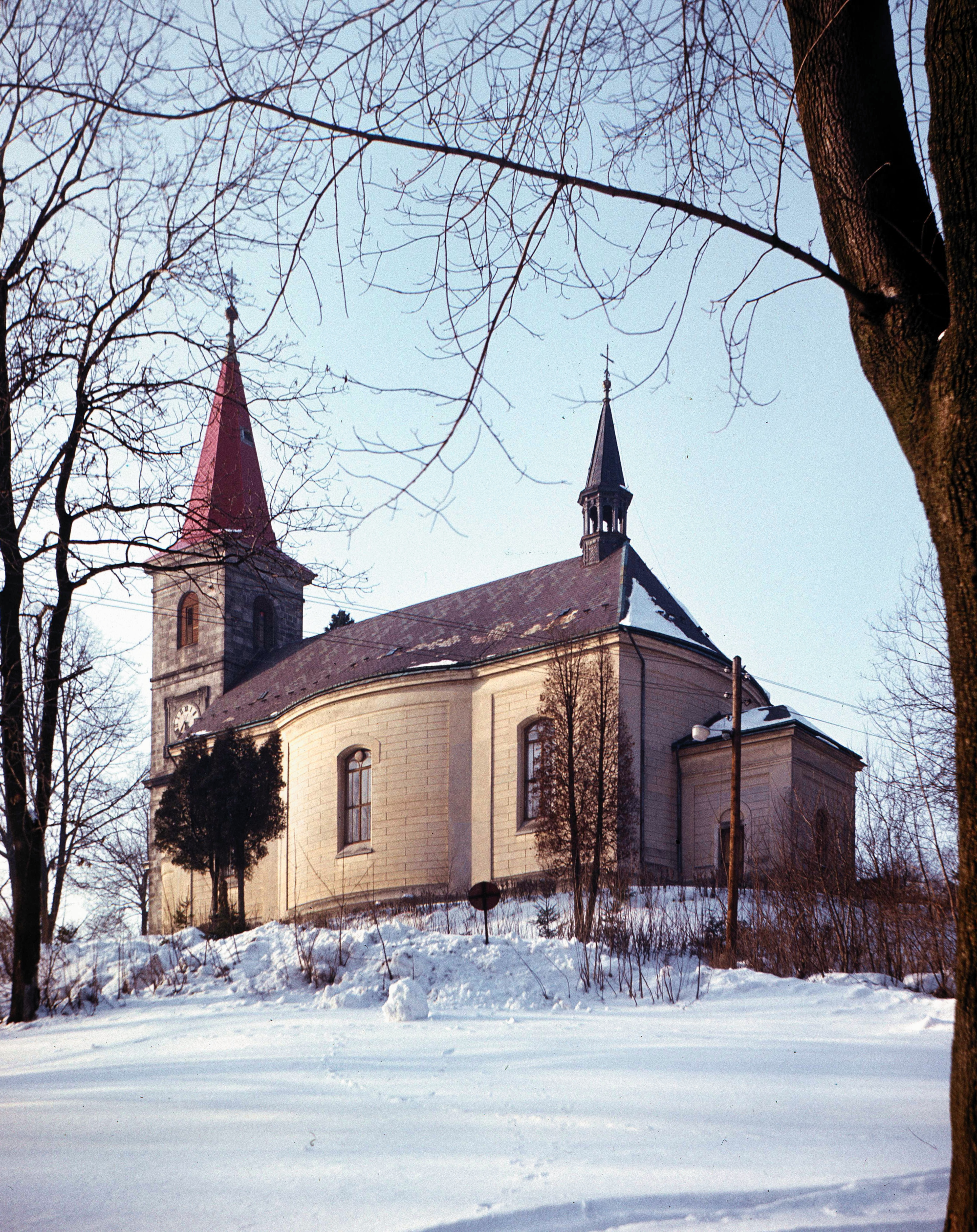 kostel sv. Petra a Pavla v Horním Tanvaldu ca. 1984 v zimě. Scanováno z negativu 6x6